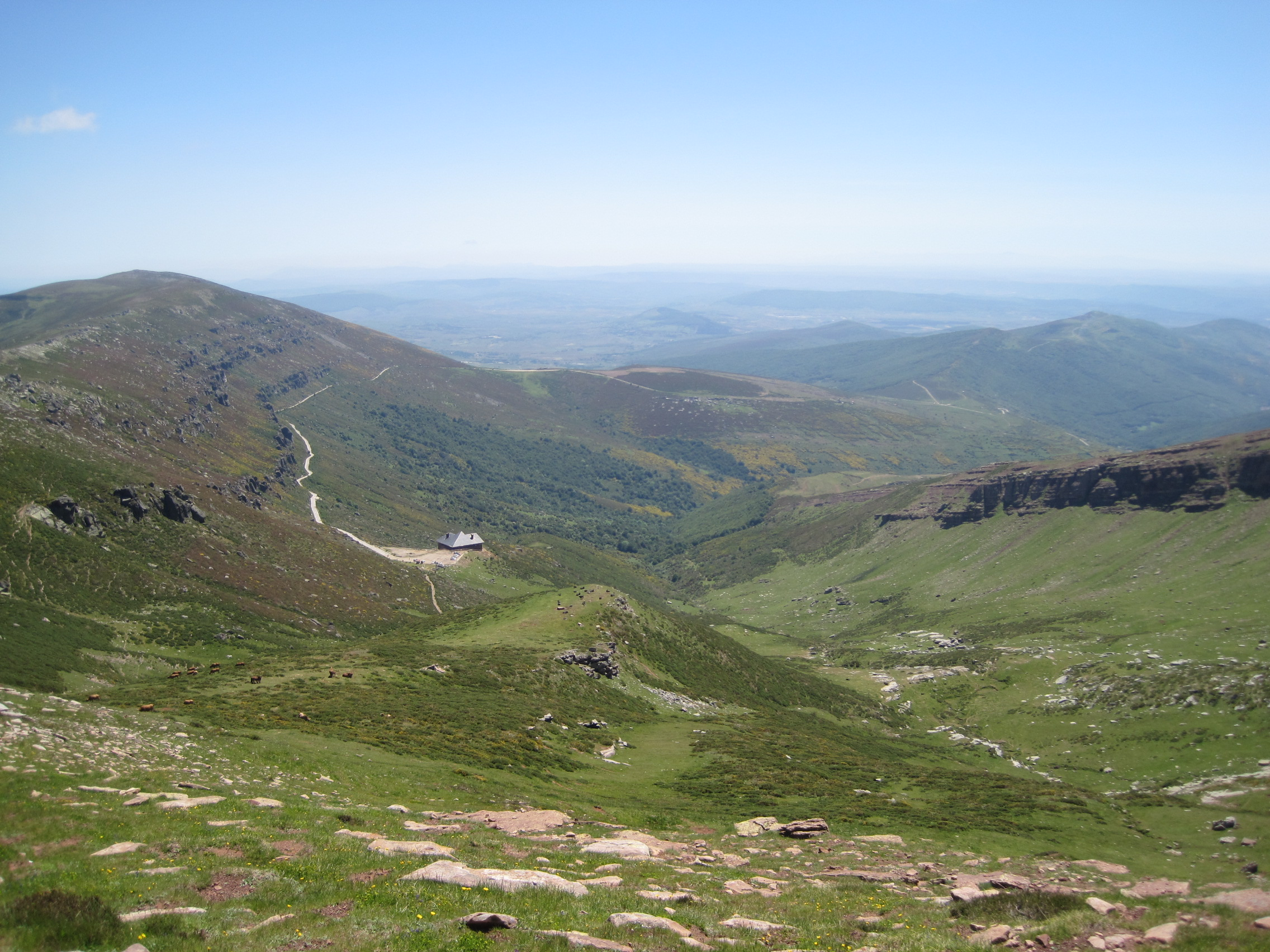 Vista del refugio de El Golobar desde el pico Valdecebollas, en Palencia (España).